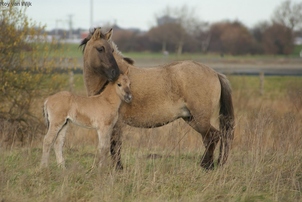 Wild Konik horses